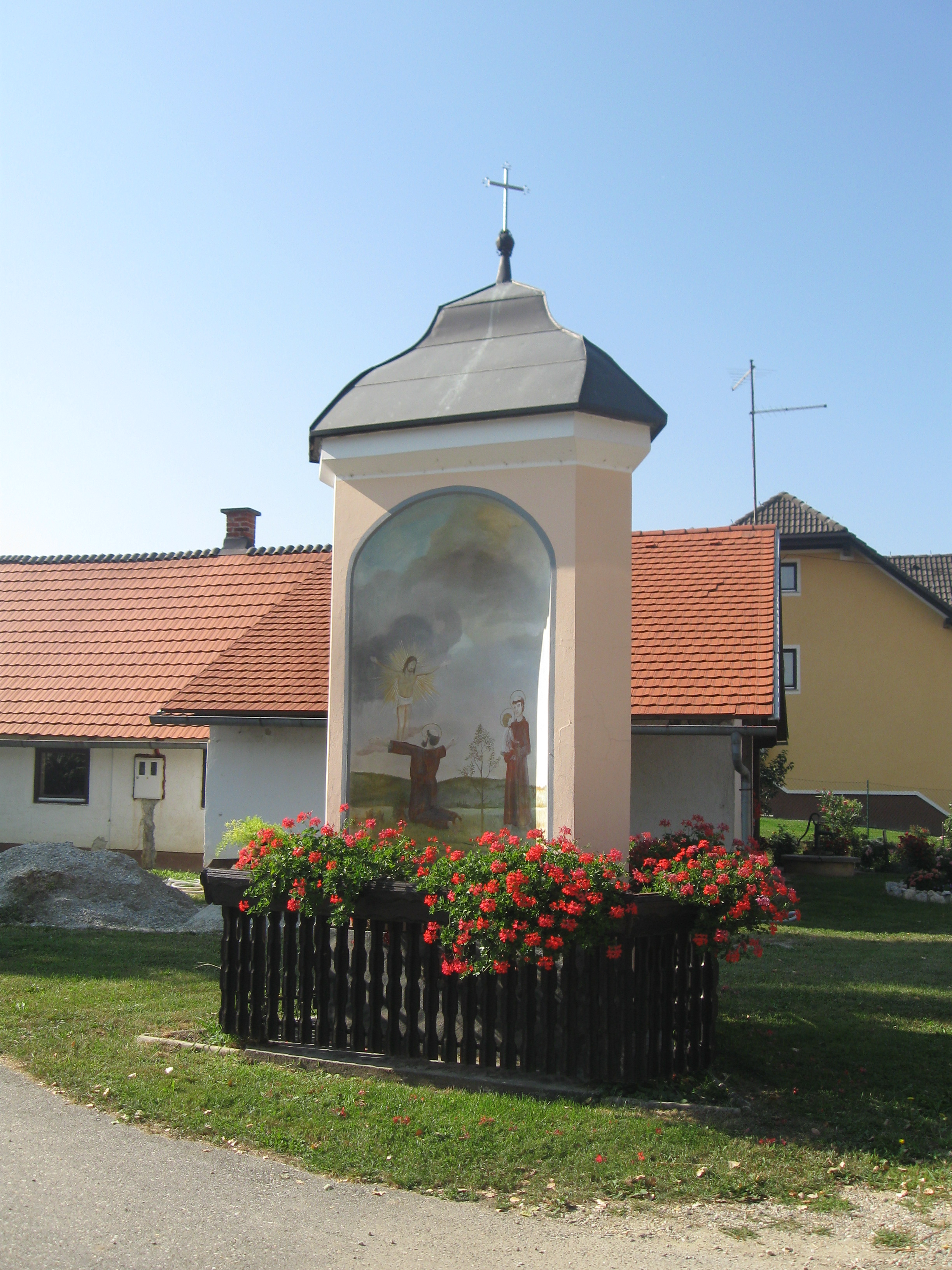 Trikotno znamenje iz leta 1795 s pločevinasto streh okrog je nizka lesena ograja. V nišah so slike sv. Družina, sv. Jurij in Florijan ter sv. Frančišek.